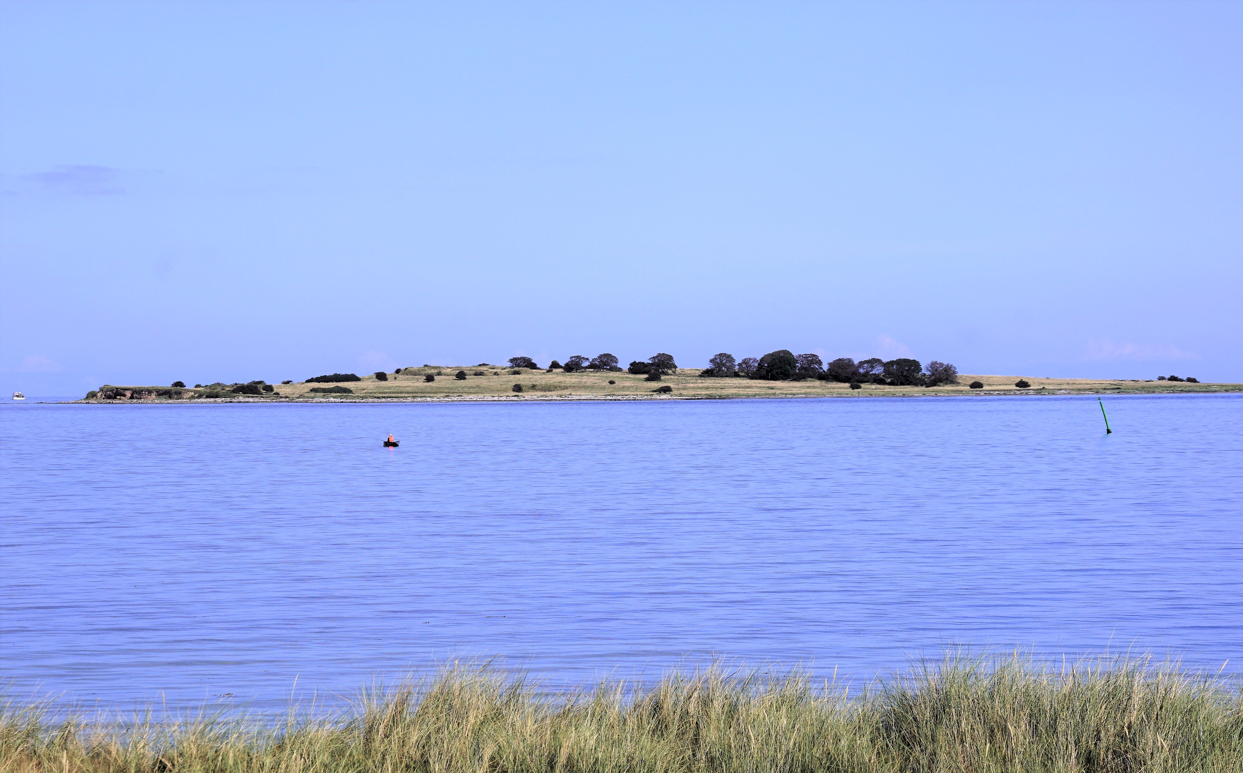 Kyholm set fra skansen på Lilleøre